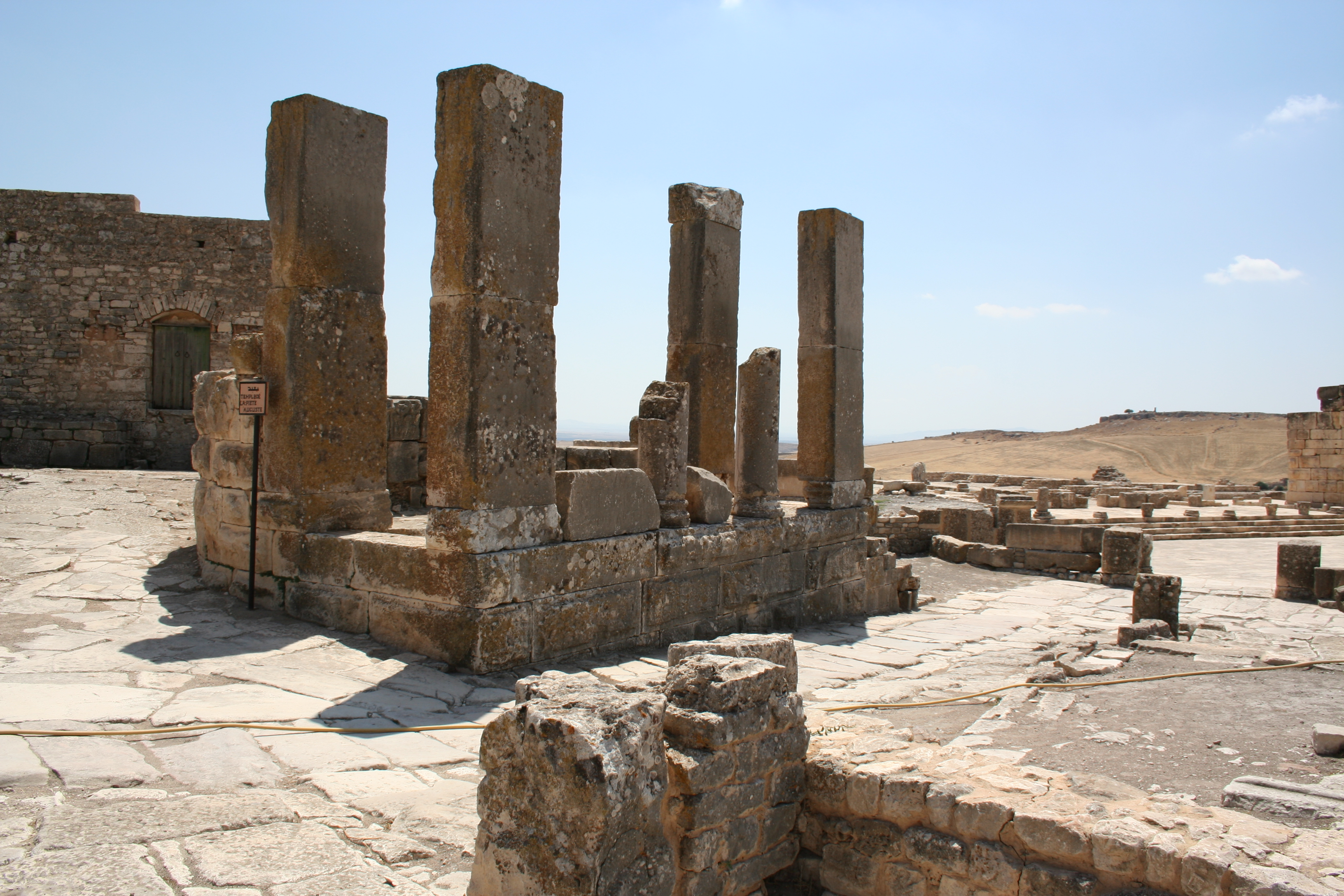 temple de la piété d'Auguste, Dougga